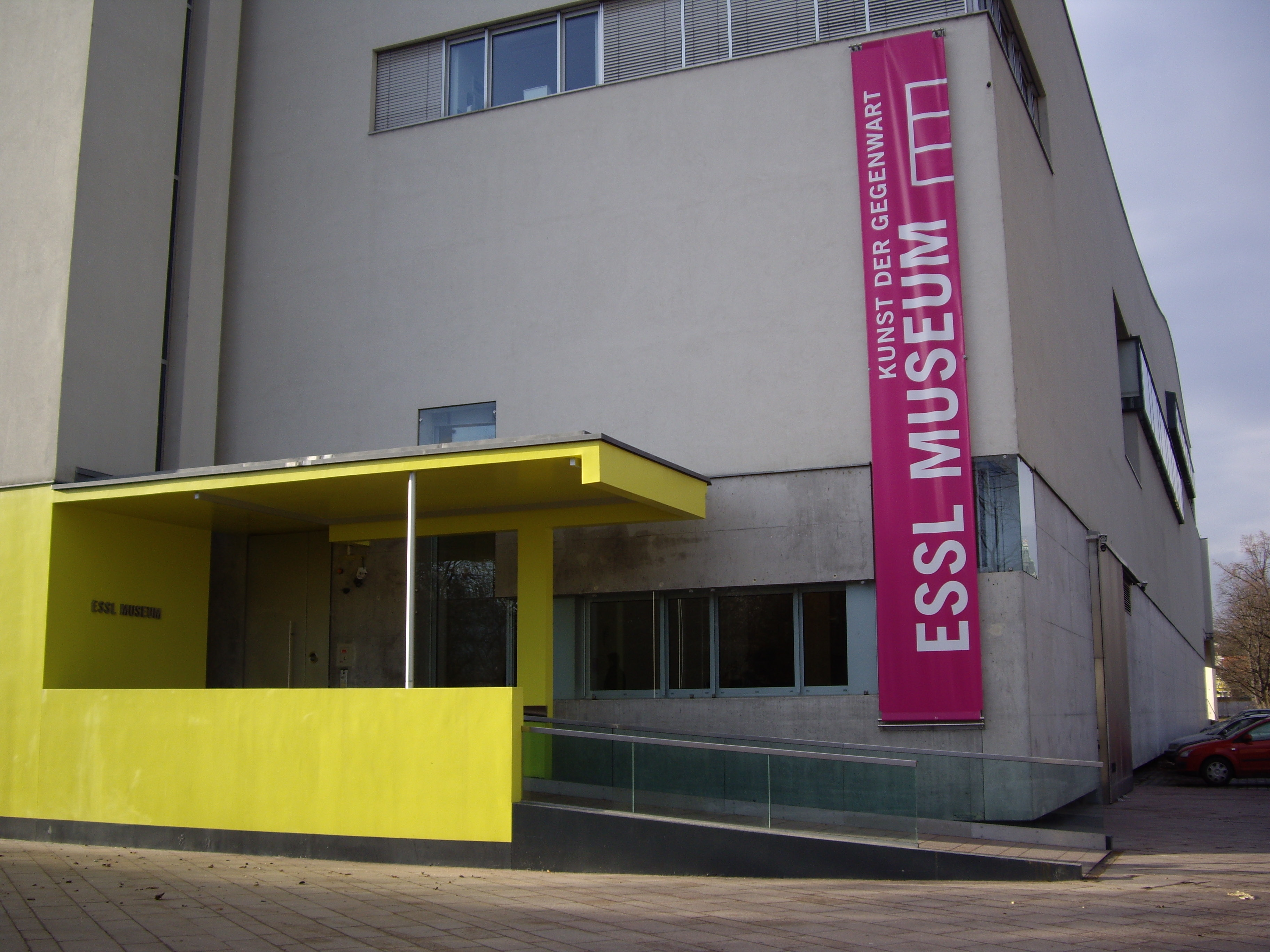 Enirejo de la ESSL-muzeo - arto de la nuntempo.